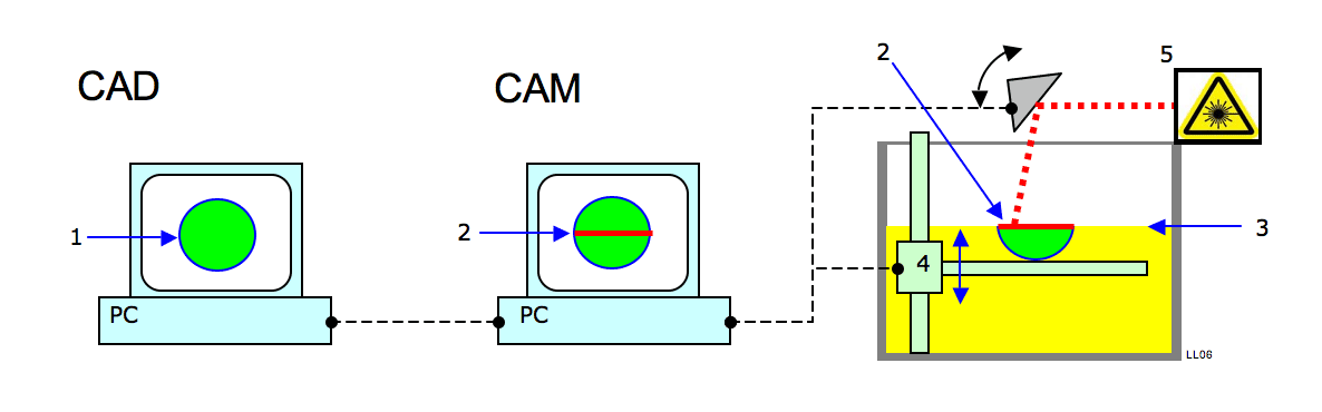 Visualisatie van het CAD_CAM proces. juli 2006 Laurens van Lieshout.